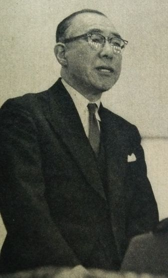 瀧川幸辰（1956年度京都大学入学式にて）